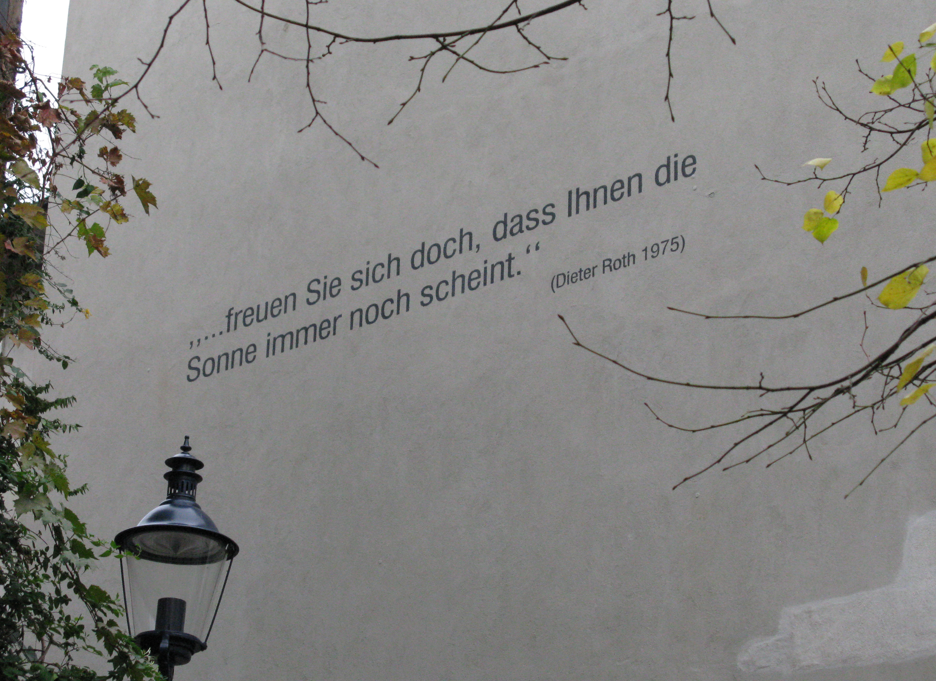 Spruch von Dieter Roth am Andreasplatz in Basel